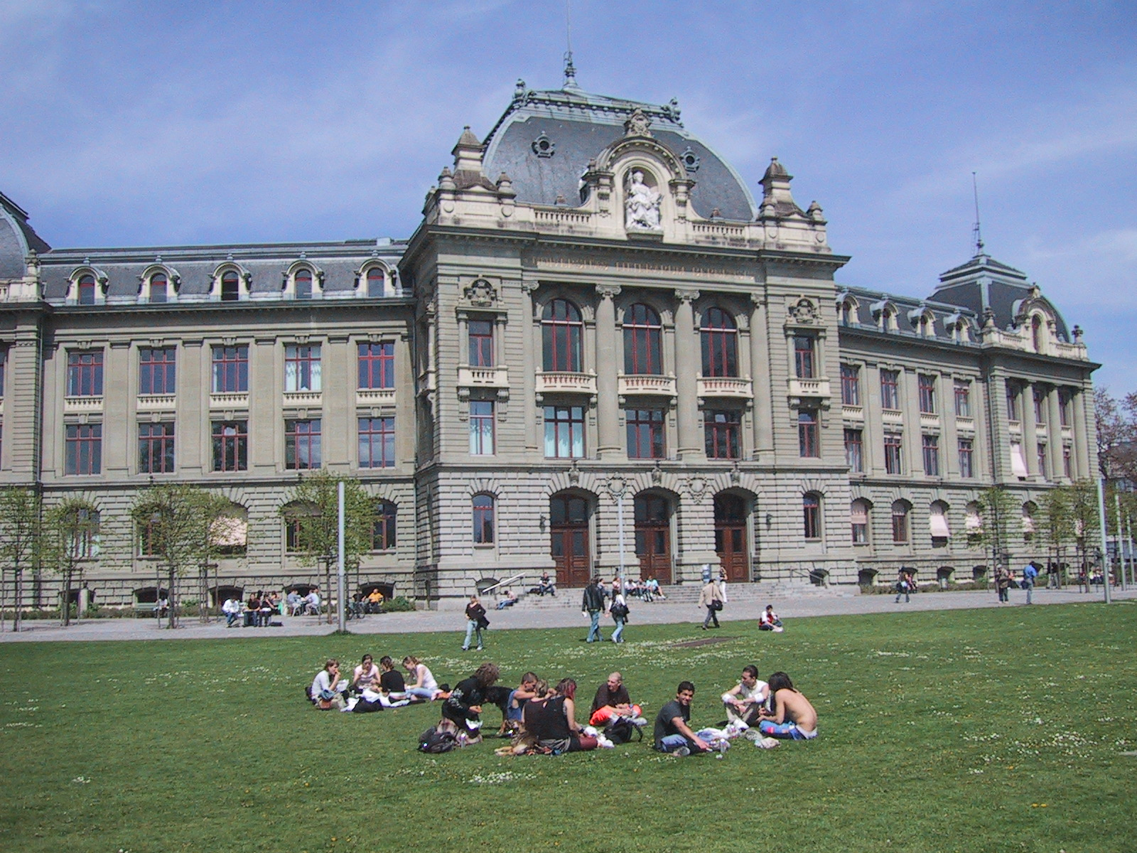 Aufnahme Universität Bern, Hauptgebäude, 29. April 2005.